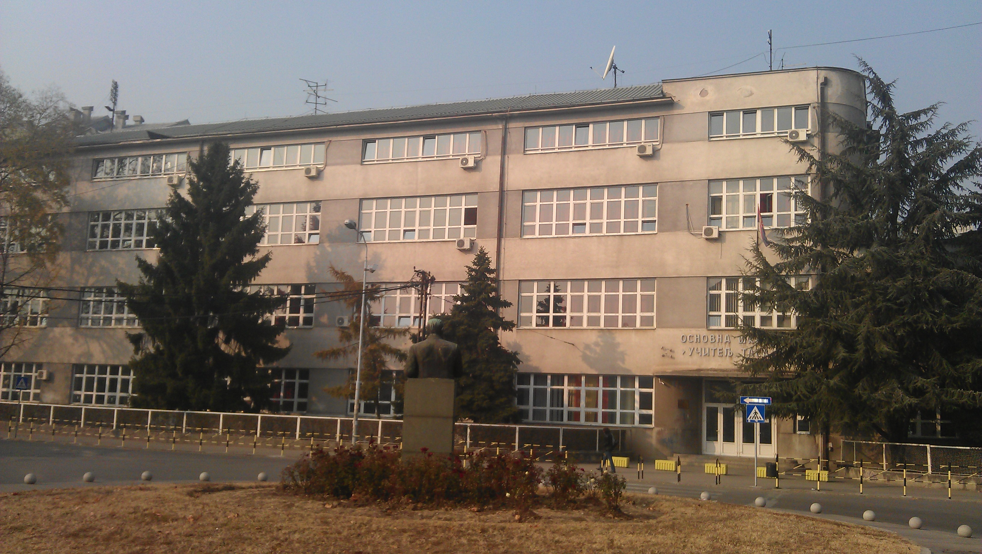 Основна школа Учитељ Таса. Снимљено мобилним телефоном.